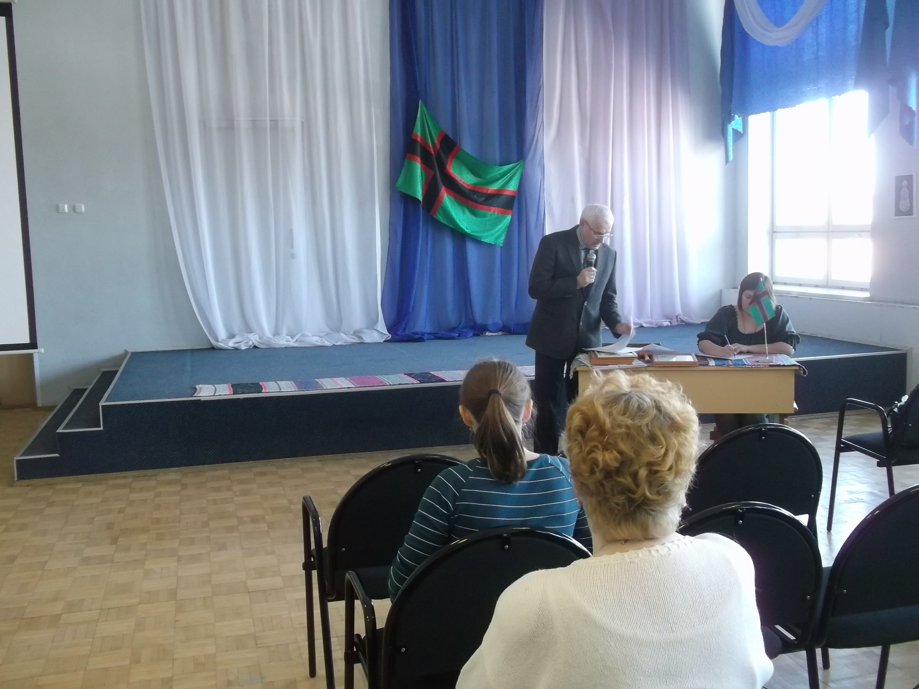 Собрание "Союза карельского народа" в Петрозаводске 17.03.2013 г.